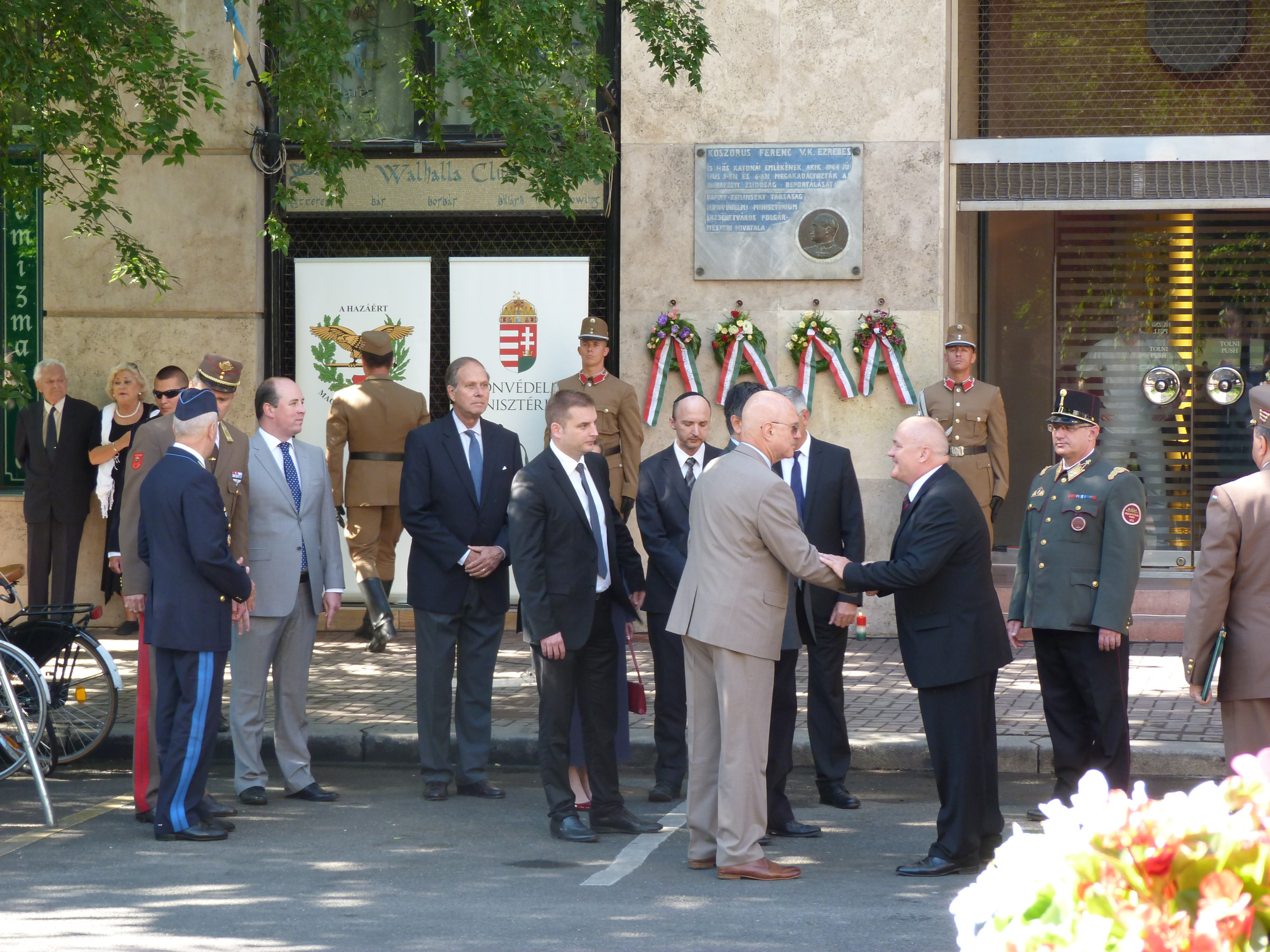 A felvétel 2014. július 4-én pénteken készült Budapesten, a Dohány utcában. Koszorús Ferenc emléktáblájának koszorúzása. Koszorúzott: Hende Csaba honvédelmi miniszter, Koszorús Ferenc. Az ünnepélyes koszorúzáson részt vett Ilan Mor, Izrael budapesti nagykövete, André Goodfriend, az Amerikai Egyesült Államok ideiglenes ügyvivője, az Országgyűlés honvédelmi és rendészeti bizottságának alelnökei, Simon Miklós (Fidesz-KDNP) és Harangozó Tamás Attila (MSZP), Kun Szabó István vezérőrnagy, a Honvédelmi Minisztérium társadalmi kapcsolatokért felelős helyettes államtitkára, valamint Réthelyi Miklós, volt nemzetierőforrás-miniszter.